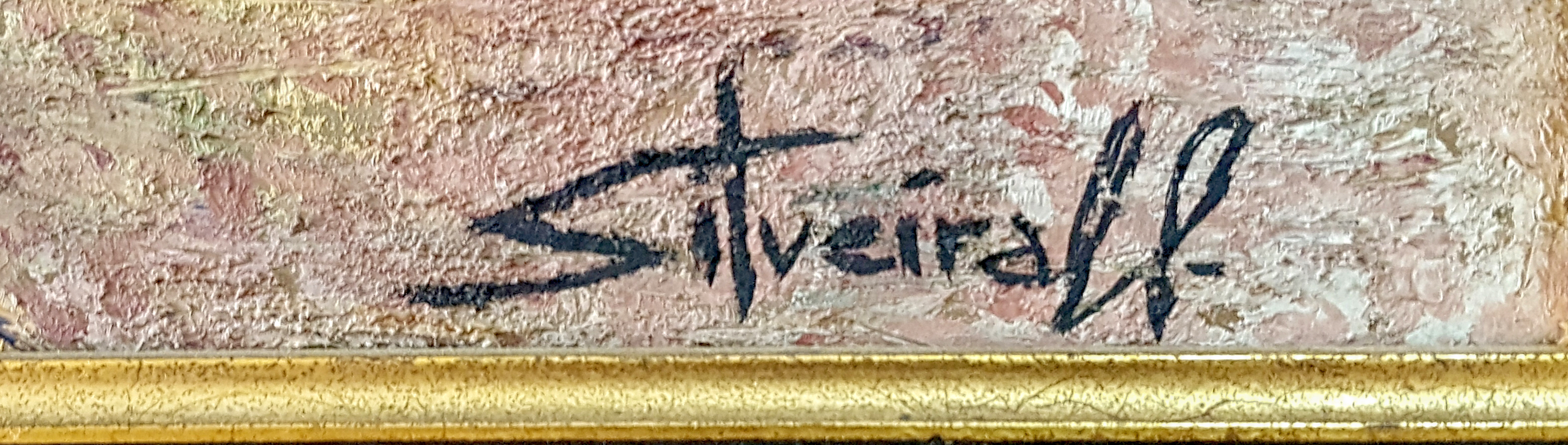 Impresión, 1976. Acrílico sobre aglomerado de madera, 69 x 88 cm. Detalle de la firma. Guillermo Silveira García (1922–1987) Description painter, sculptor, military personnel and art educatorDate of birth/death 11 January 1922 11 May 1987Location of birth/death Segura de León BadajozWork periodcirca 1945-1987Work location BadajozAuthority control : Q5888937 VIAF: 100940319 ISNI: 0000 0000 7827 0108 GND: 139488154 BNE: XX4841676 creator QS:P170,Q5888937